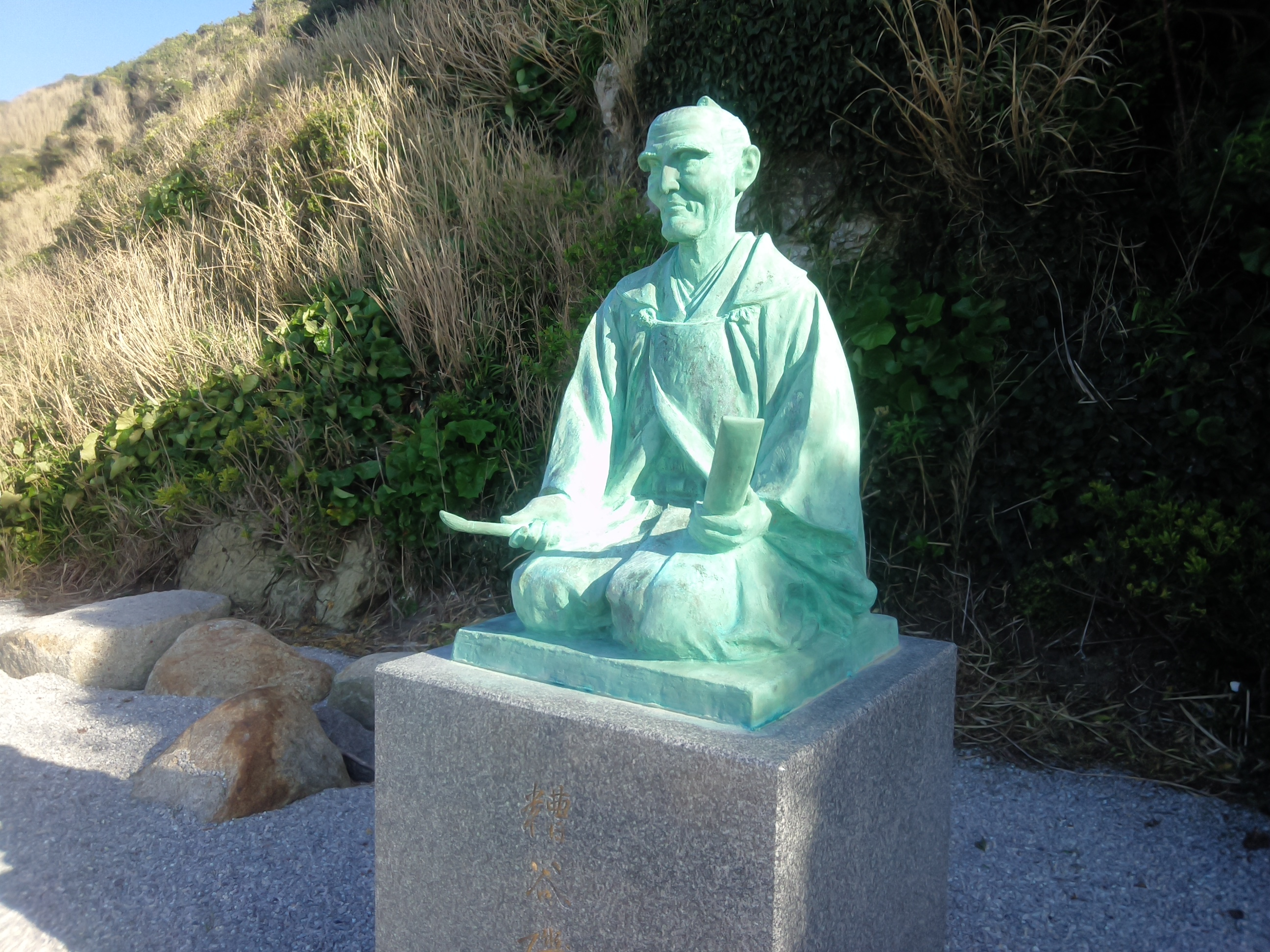 糟谷磯丸像 愛知県田原市 伊良湖岬